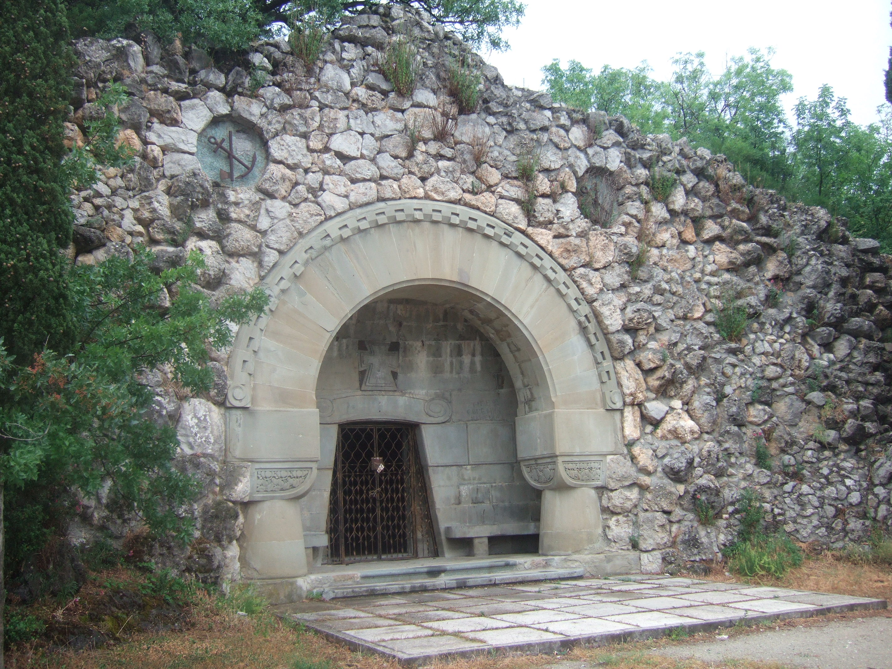 Фамильный склеп владельца имения Суук-Су Владимира Березина. Находится на территории МДЦ "Артек".